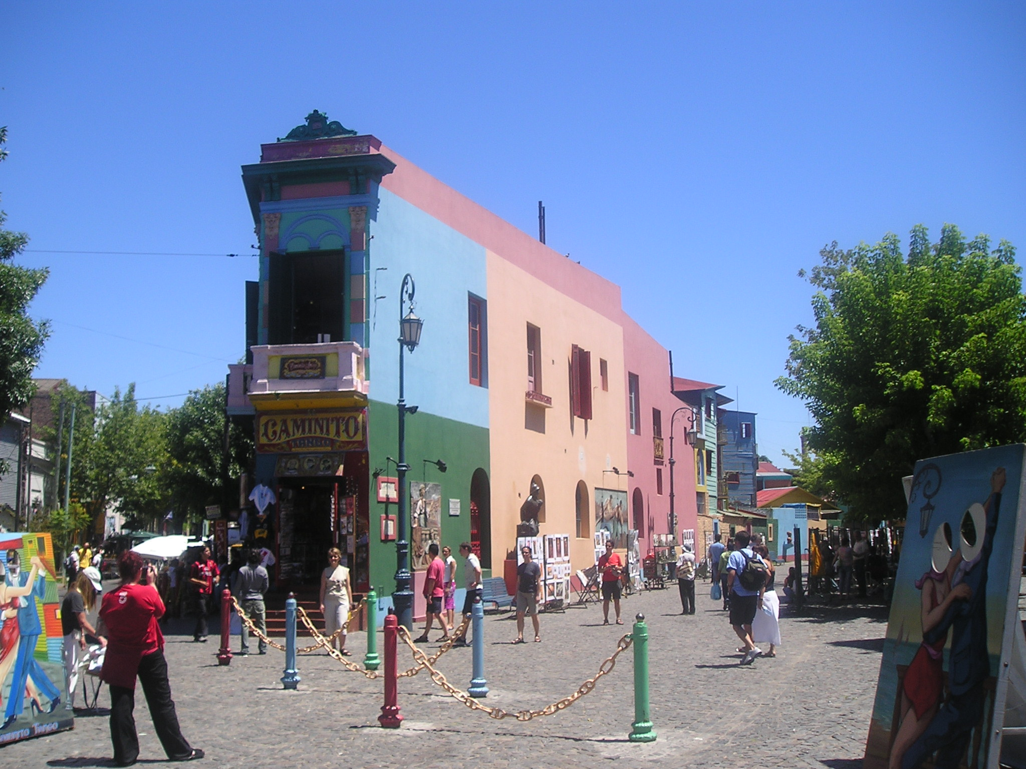 El Caminito de La Boca - Buenos-Aires